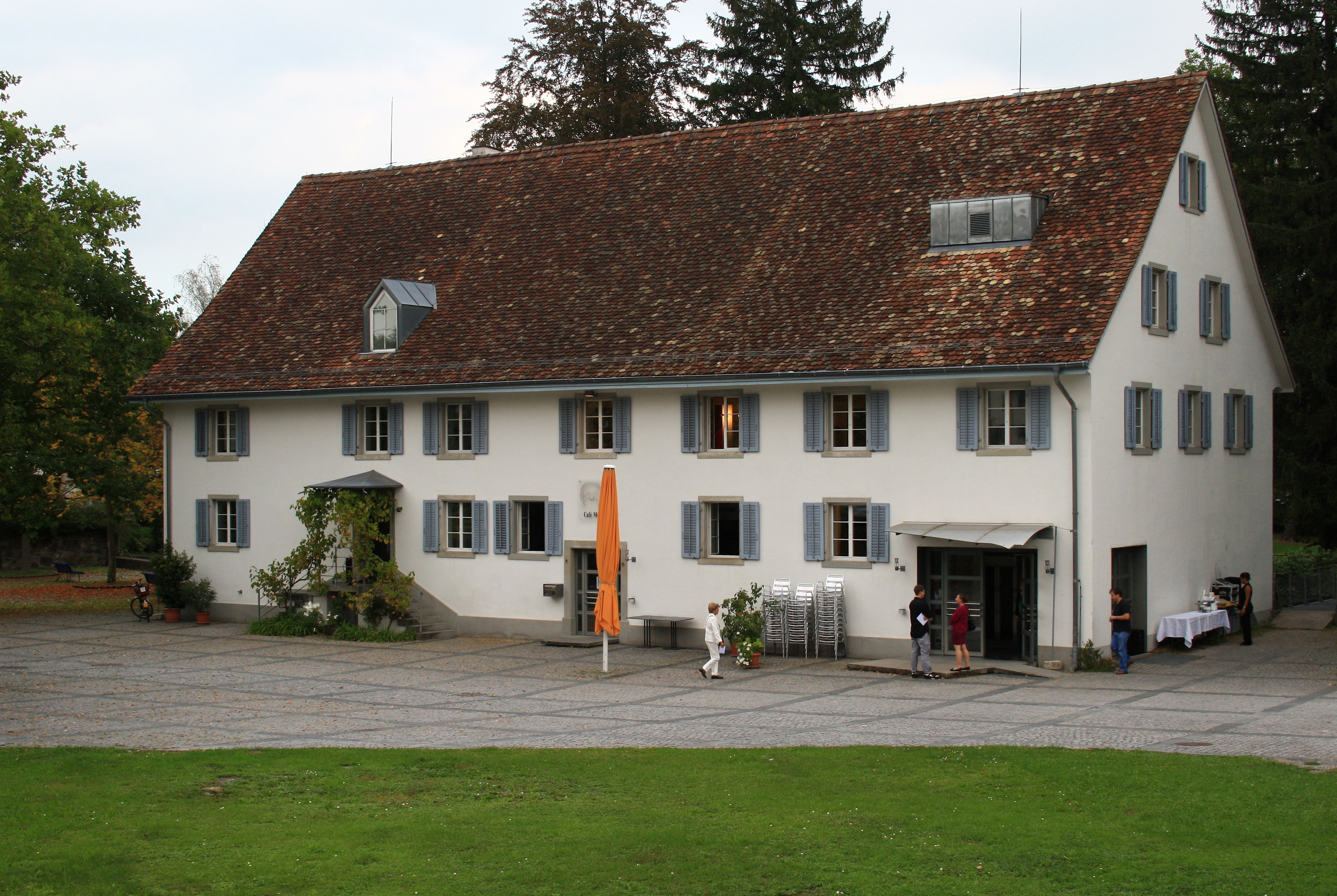 Obere Mühle in Dübendorf (Switzerland)